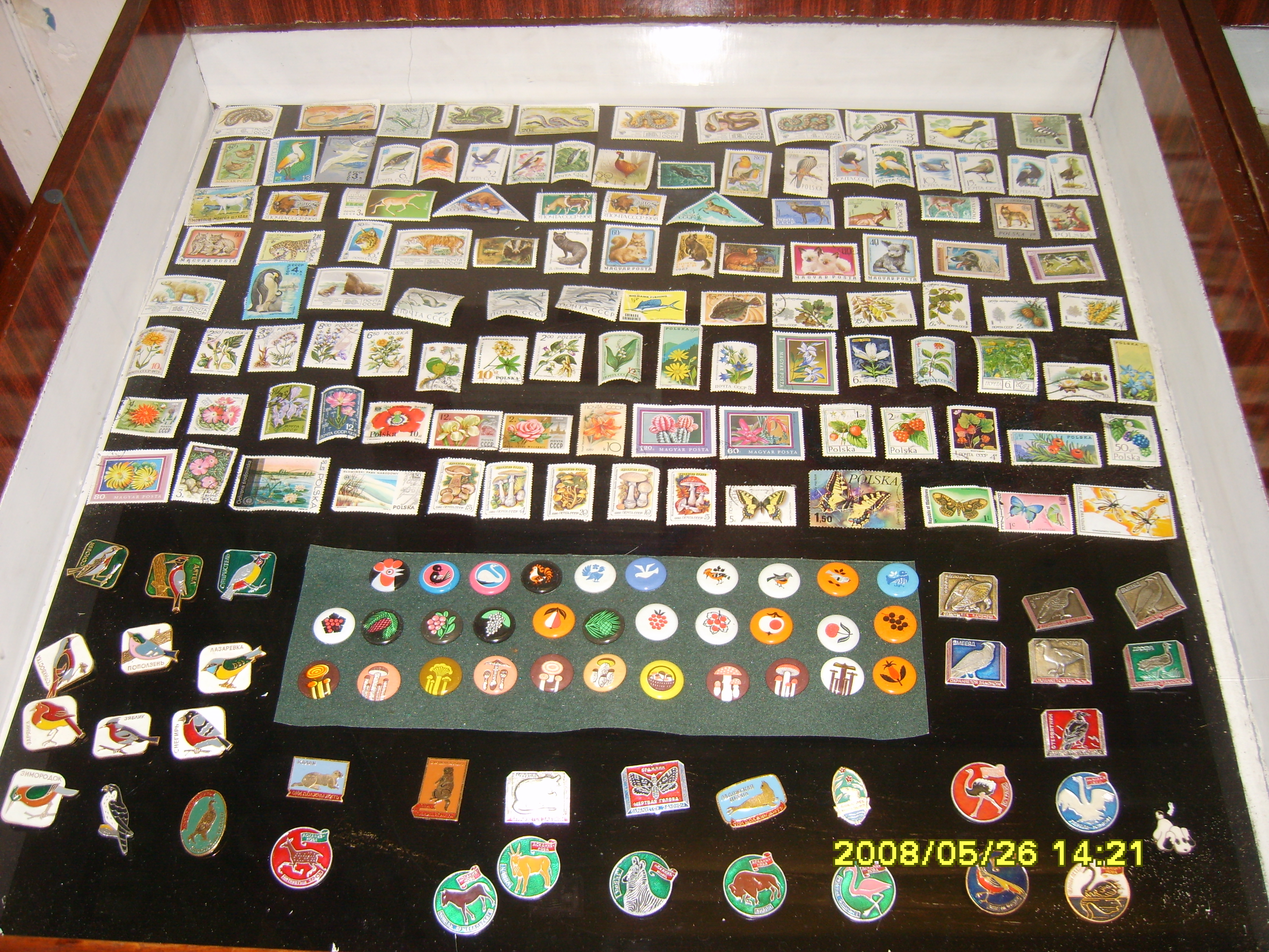 Експозиція поштових марок у Кременецькому музеї